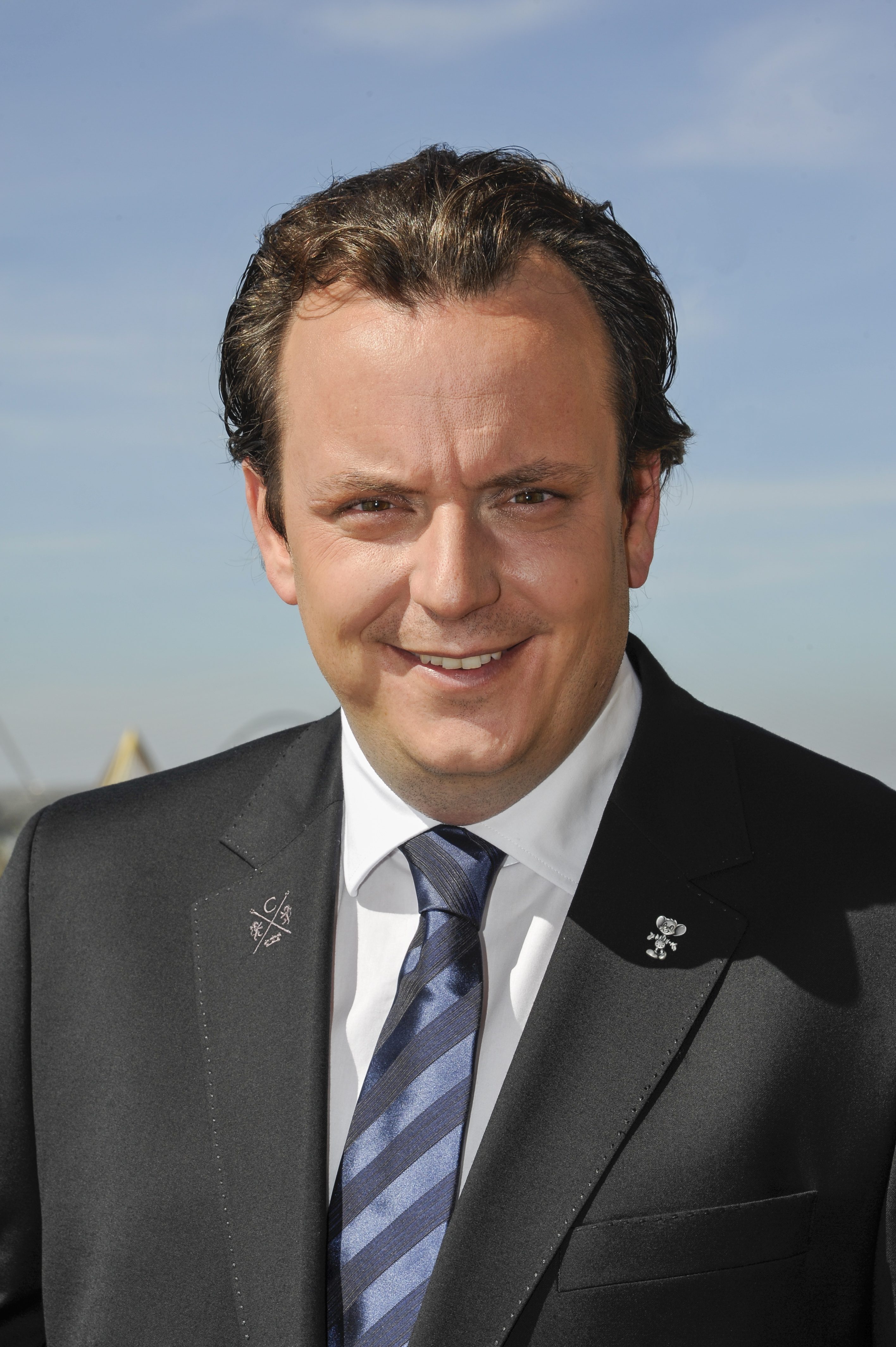 Michael Mack